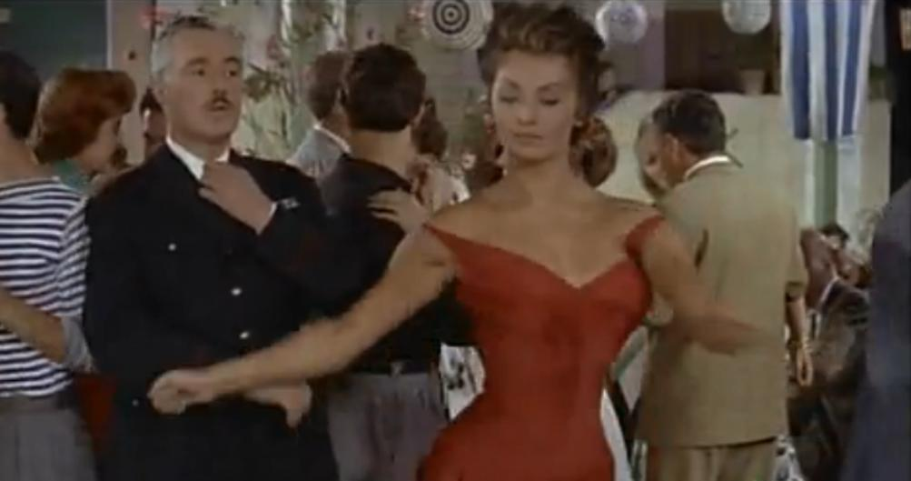 Vittorio De Sica e Sofia Loren nel film "Pane amore e...", film del 1955 di Dino Risi. Scena in cui ballano il Mambo.